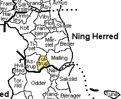 Kort der viser Tulstrup Sogn, Ning Herred, Århus Amt, Denmark.